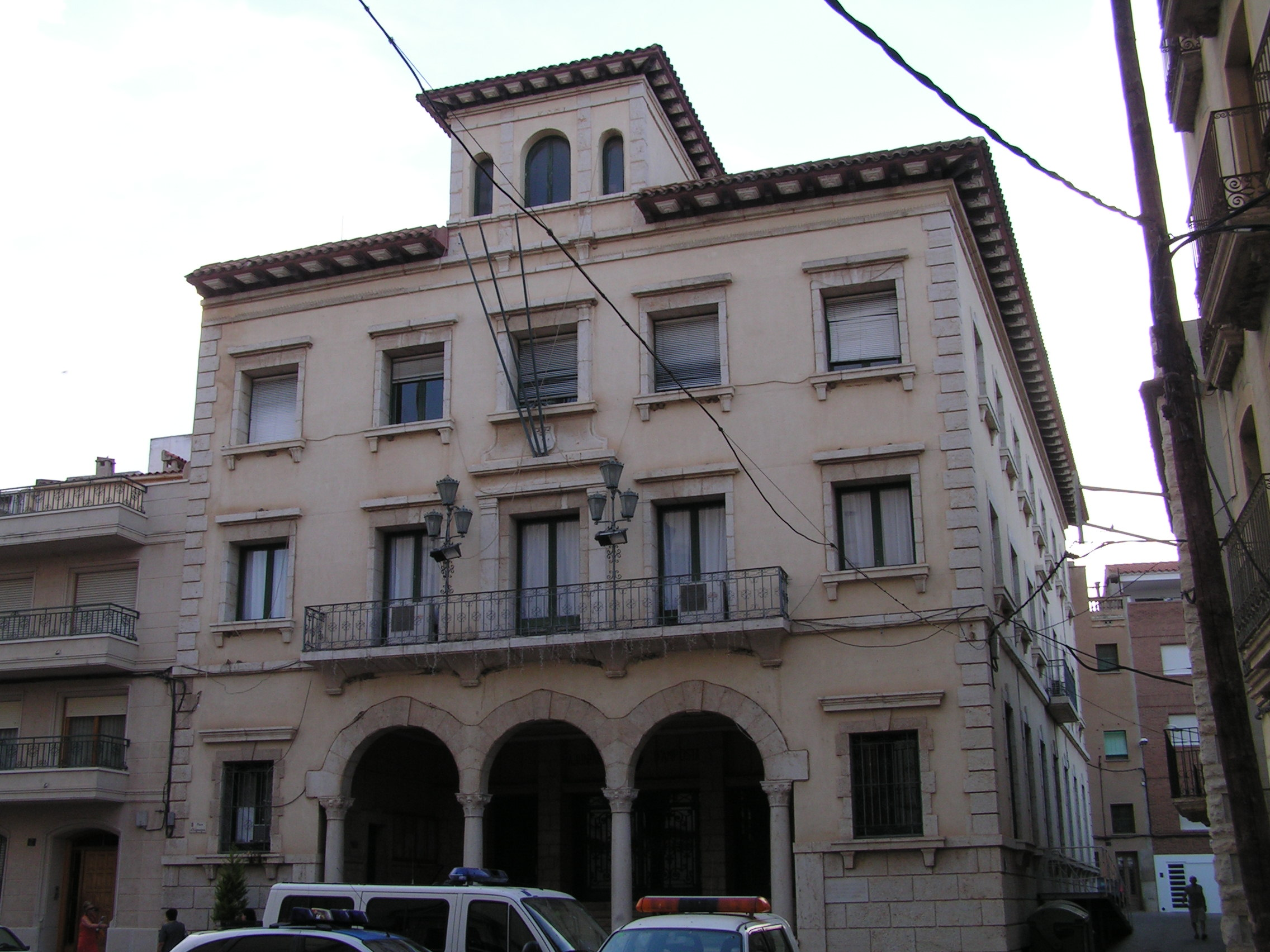 Ajuntament d'Amposta